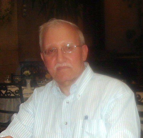 صورة للدكتور فهد سالم الشكرة - 2006